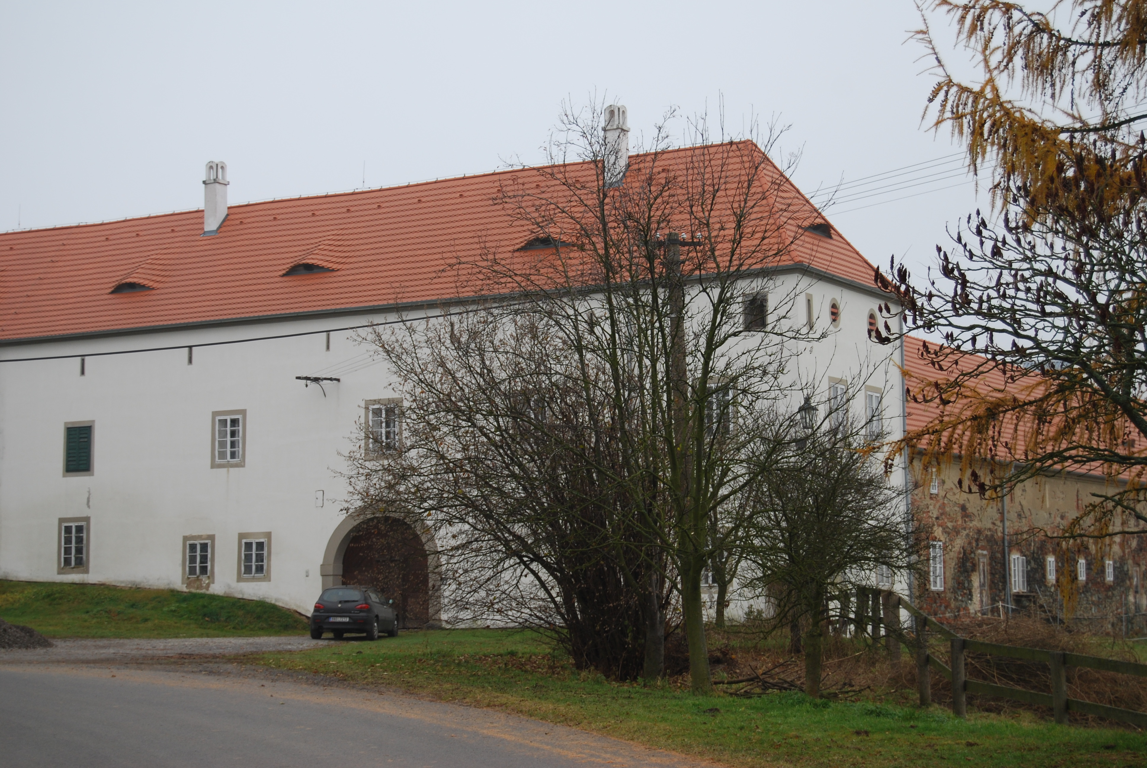 Tvrz v obci. Draheničky je část obce Mišovice v okrese Písek. Česká republika.